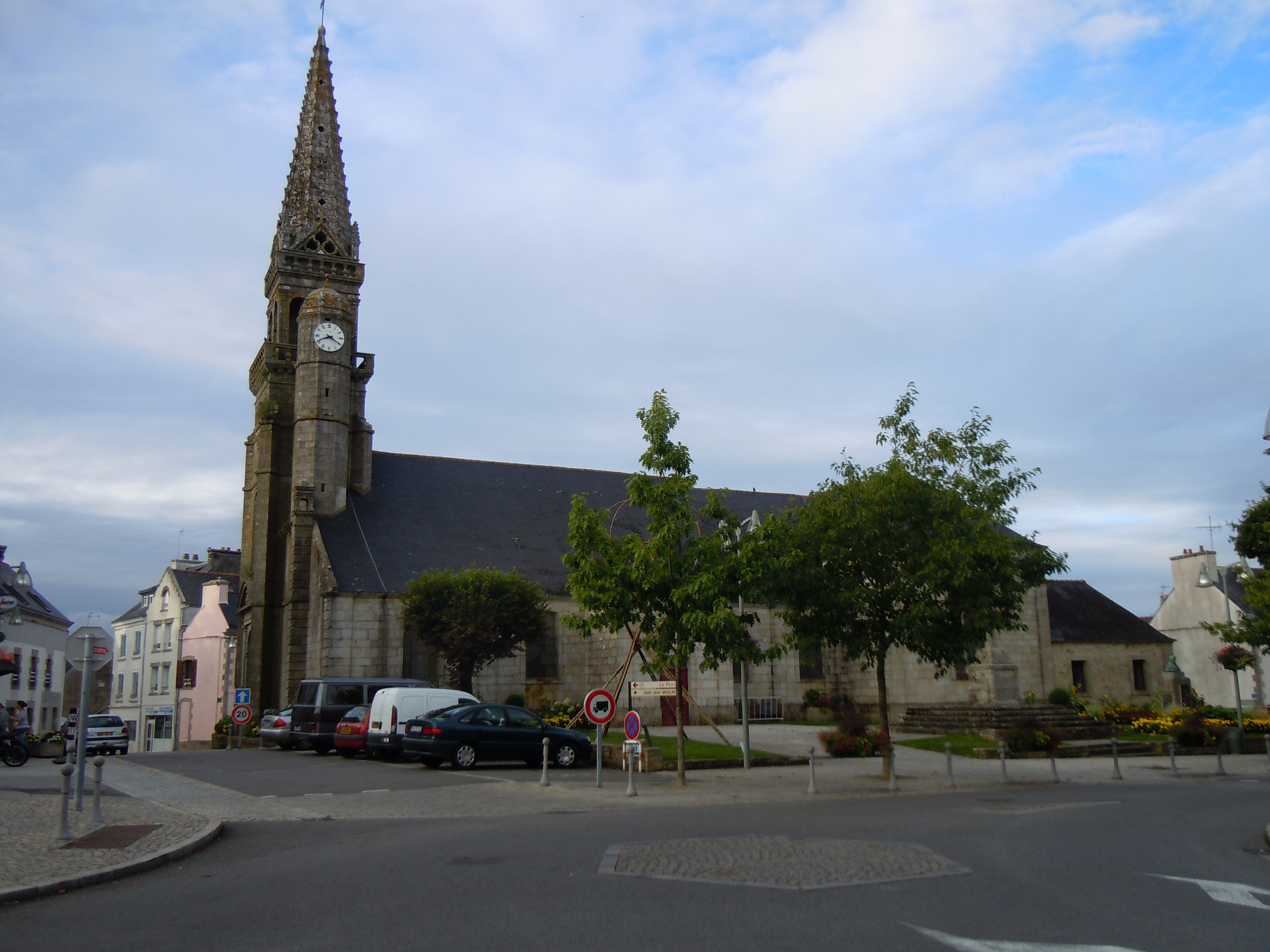 église paroissiale Notre-Dame-de-Folgoët, commune de Bannalec, département du Finistère, France